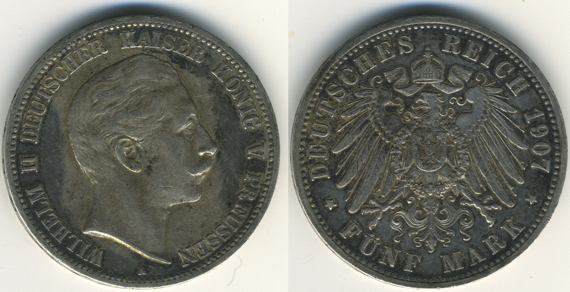 Fünf Mark, 1907